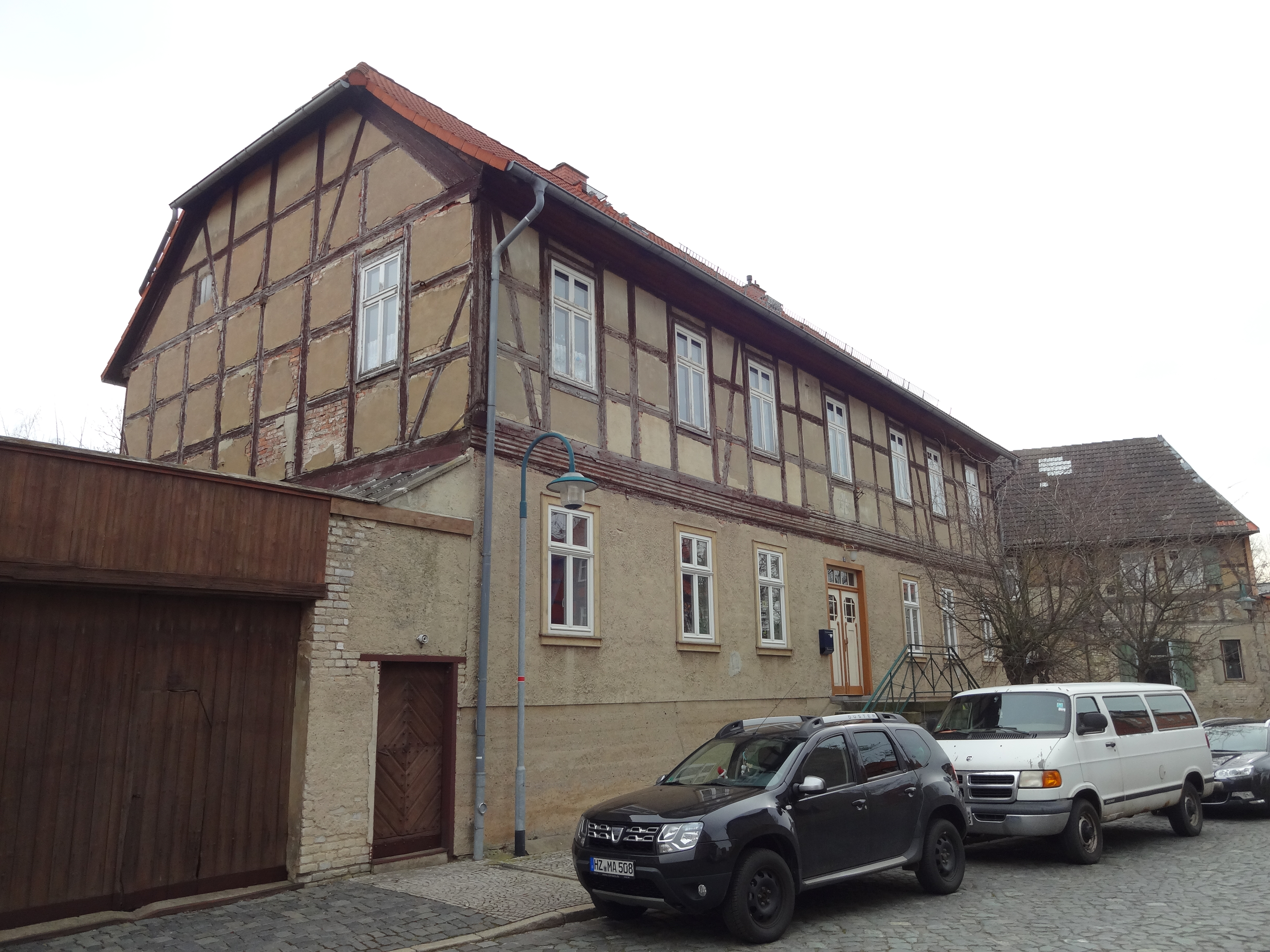 Kulturdenkmal in Derenburg